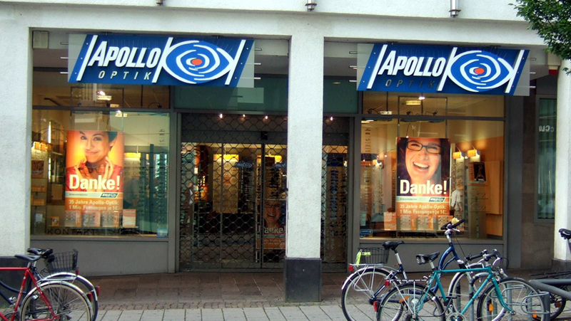 Apollo Optik Geschäft in Darmstadt